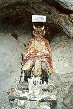 Fotografia del tio de la mina (Wari,Tiw) en Oruro, Bolivia.